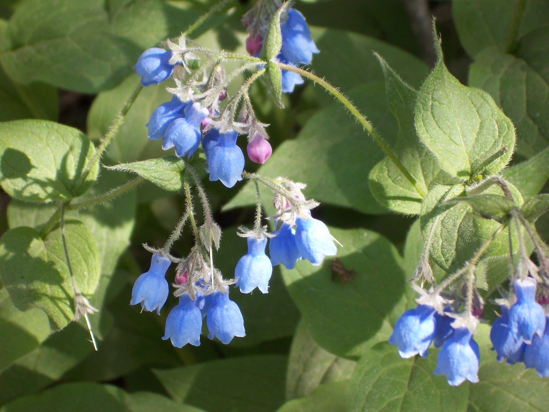 Alaskan wild flowers.